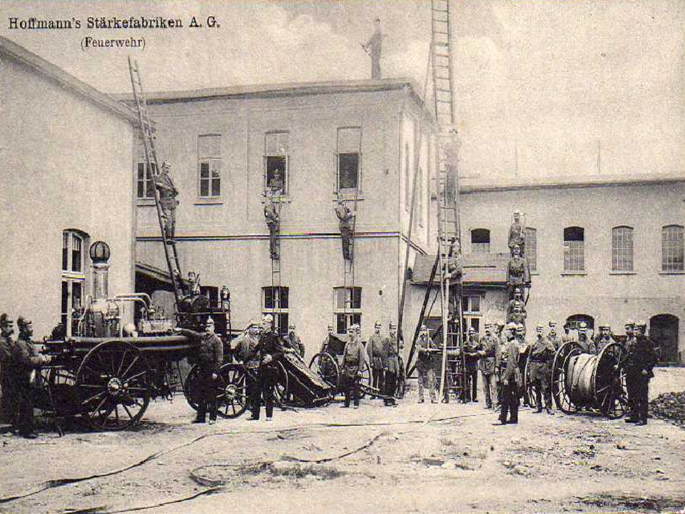 Ansichtskarte Werksfeuerwehr der Hoffmann´s Stärkefabriken, Salzuflen